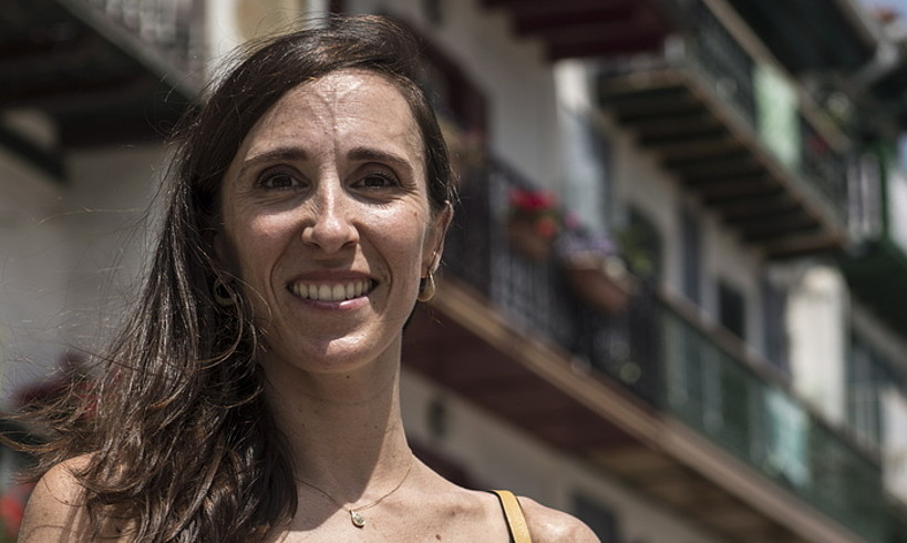 Itziar Mendizabal. Bailarina